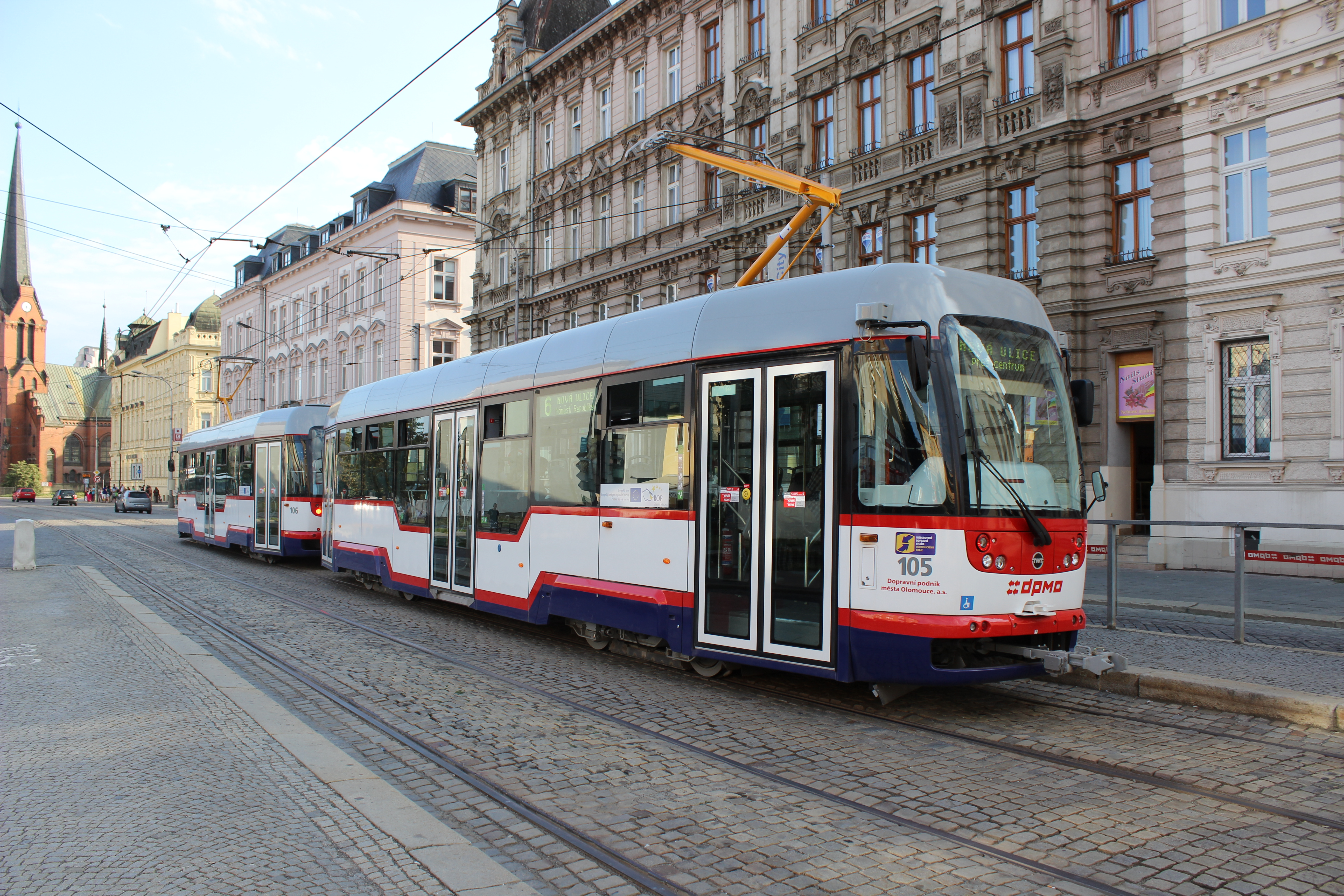 Konci (zády) k sobě spřažené tramvajové vozy na lince číslo 6 v zastávce Náměstí Hrdinů na stejnojmenném olomouckém náměstí.